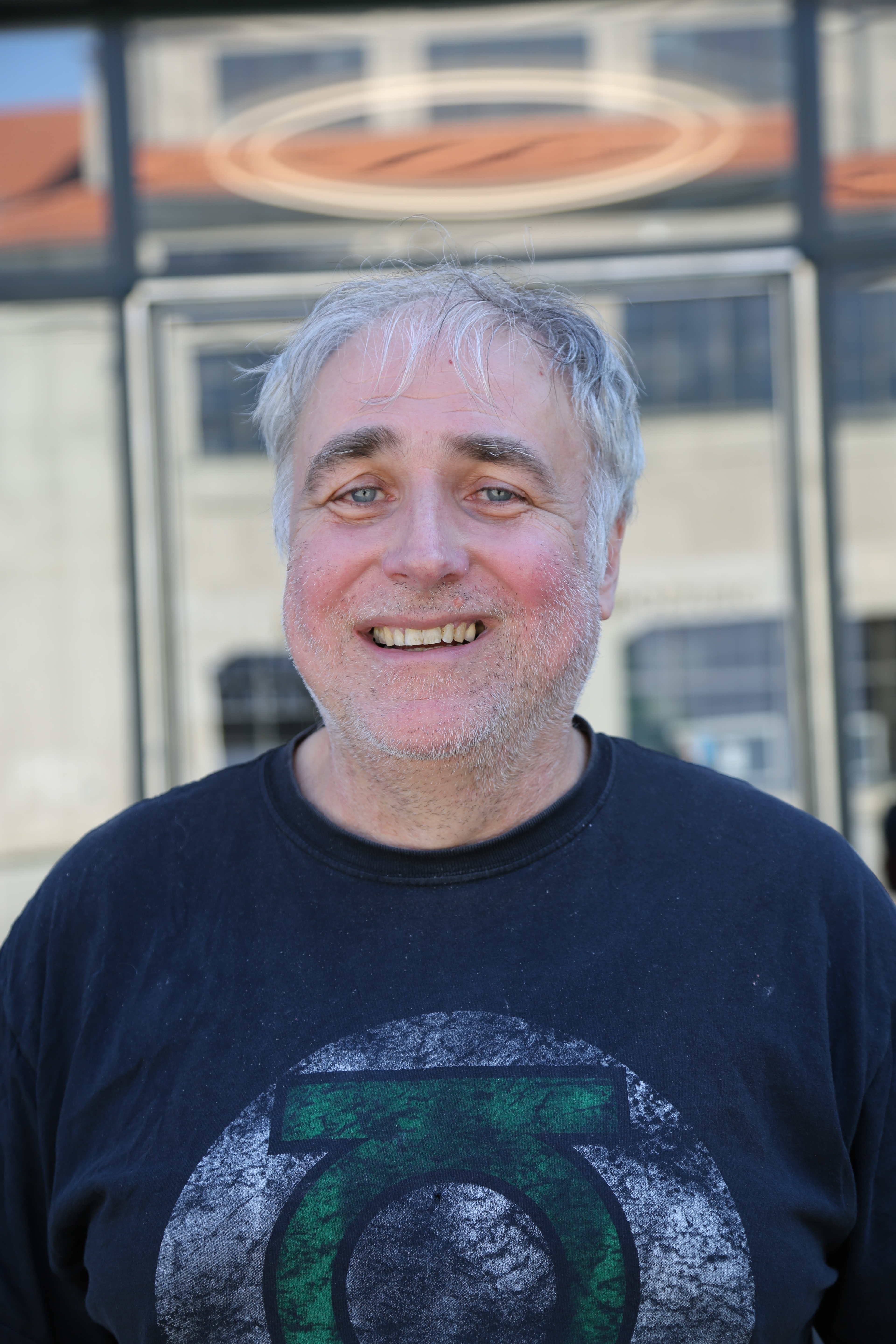 Heiner Lünstedt vor der Kongresshalle in München während dem Comicfestival 2017.